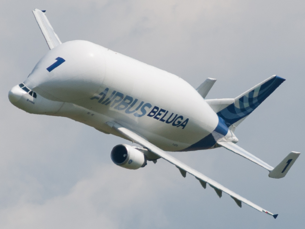 AirExpo 2014 - Beluga